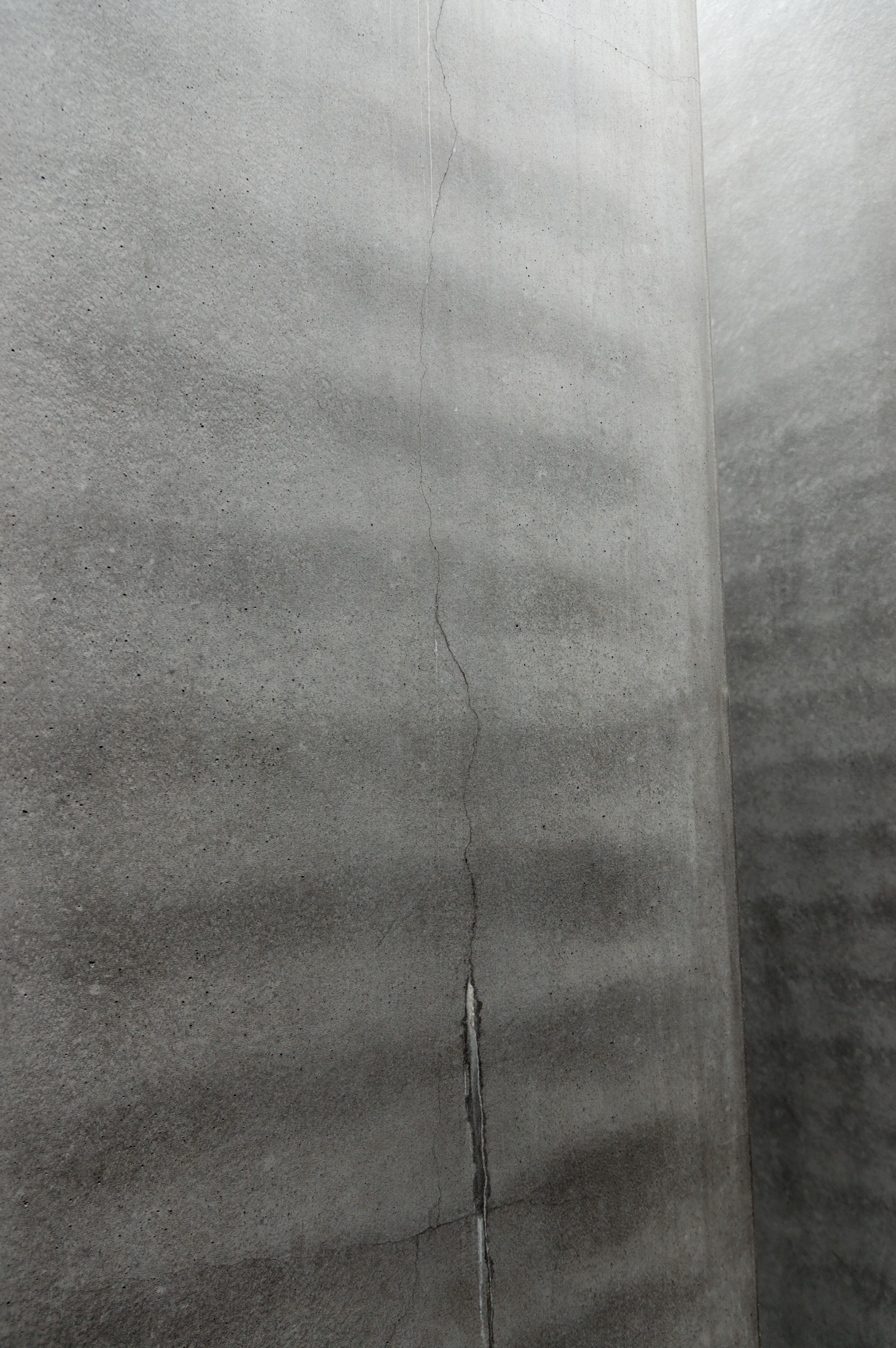 Risse im Holocaust-Mahnmal